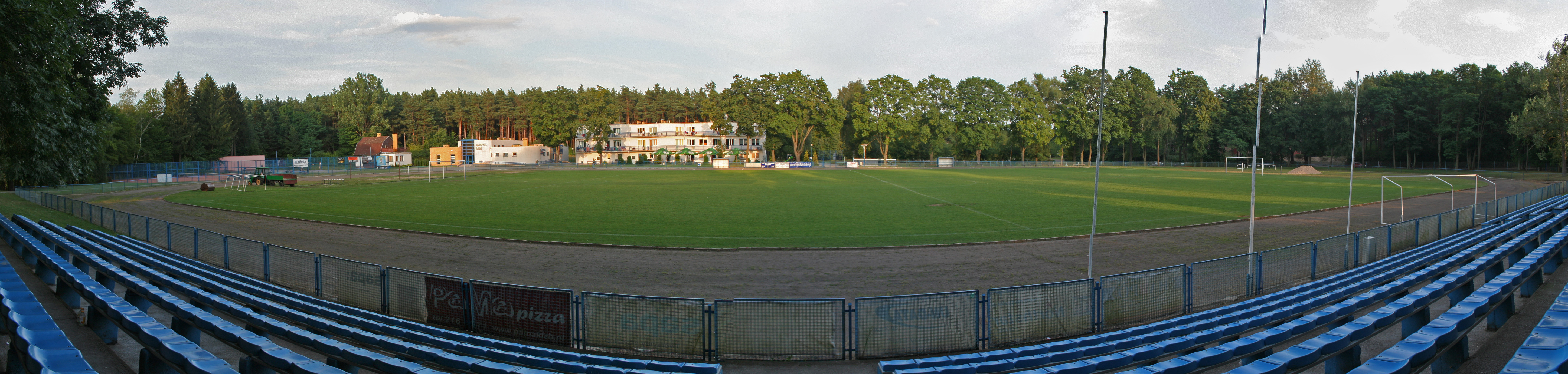 Stadion OSiR w Trzciance.